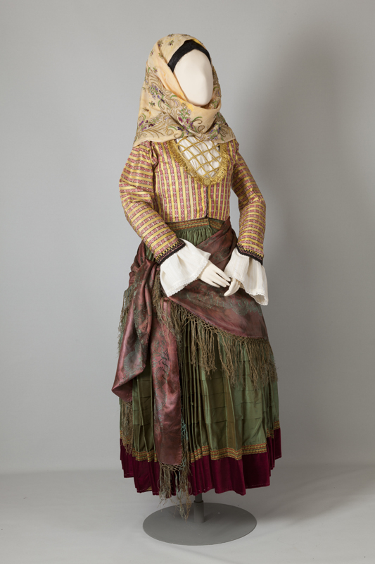 Γυναικεία φορεσιά Σπέτσες. Αρχές 20ού αιώνα Συλλογή Πελοποννησιακού Λαογραφικού Ιδρύματος, Ναύπλιο